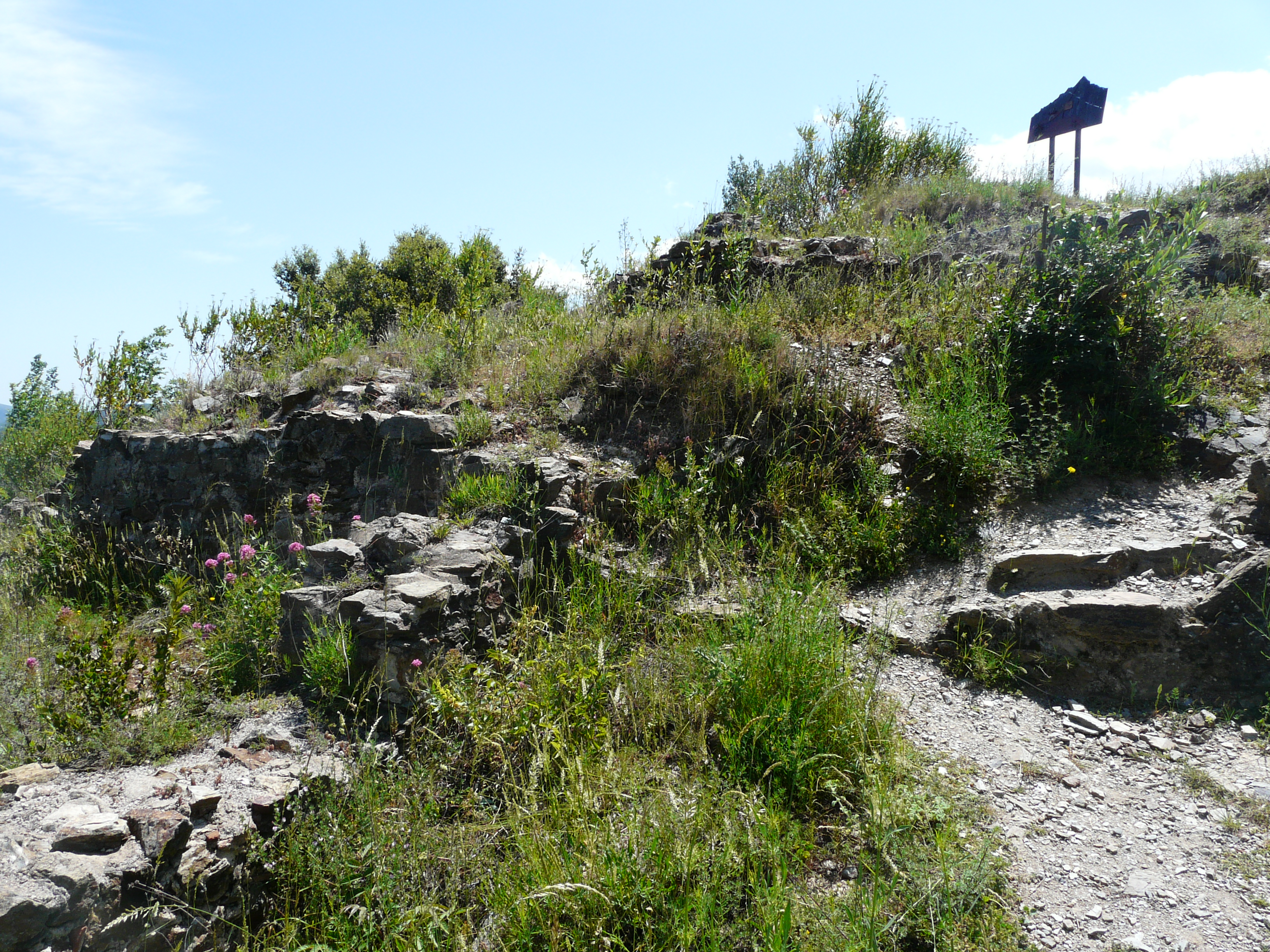 Restes del Castell de Rià